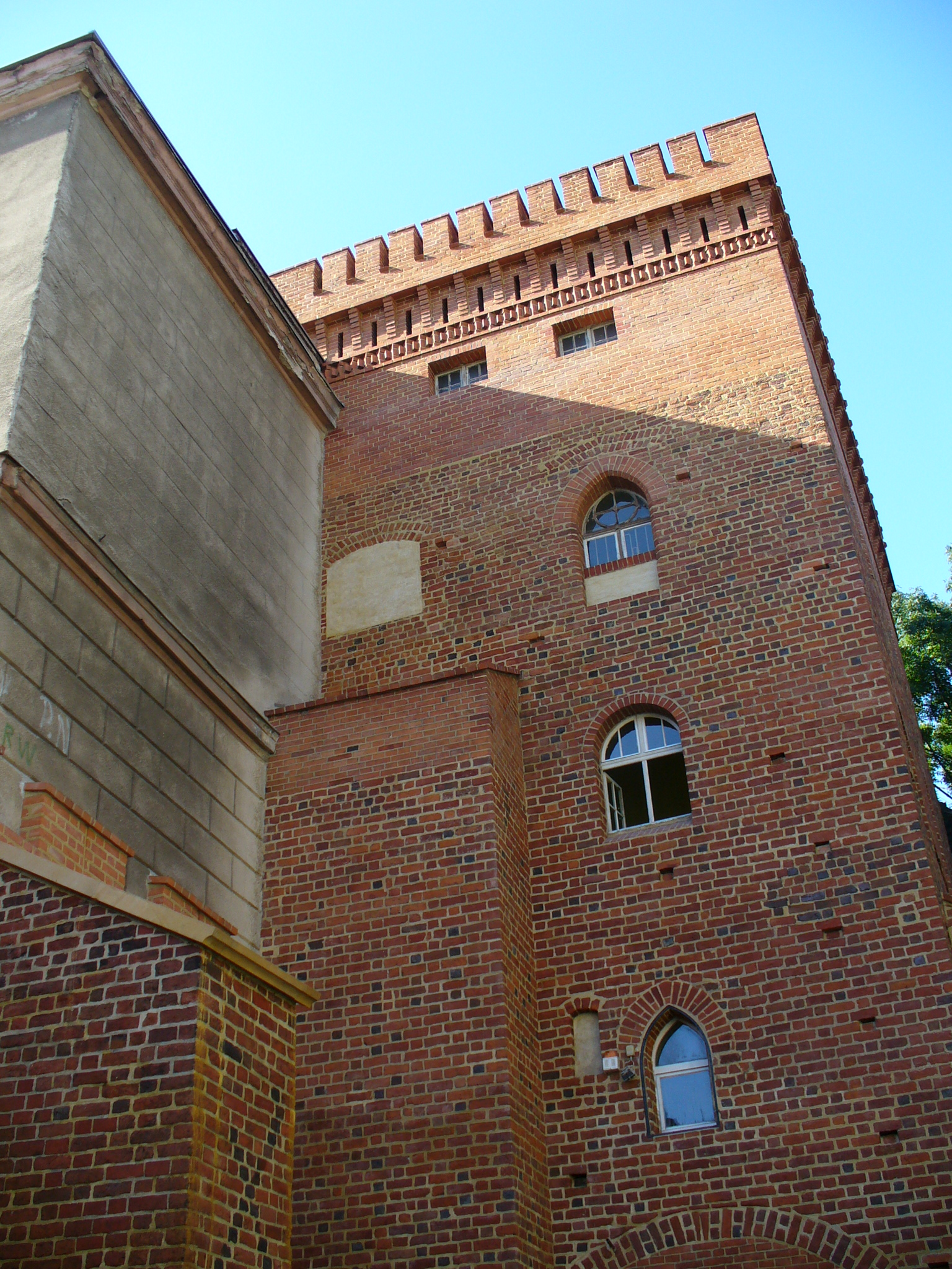 Oppeln - Opole. Wieża Zamku Górnego z neobarokową nadbudówką